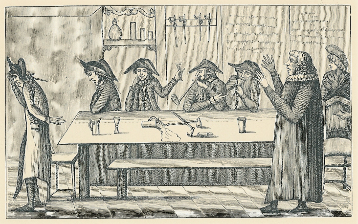 Præsten formaner tømrersvendene. Satirisk radering fra 1794 der viser kapellanen ved Nikolaj Kirke I. H. Rørbye der prøver at tale de strejkende tømrersvende til rette, i det herberg hvor de strejkende befandt sig.